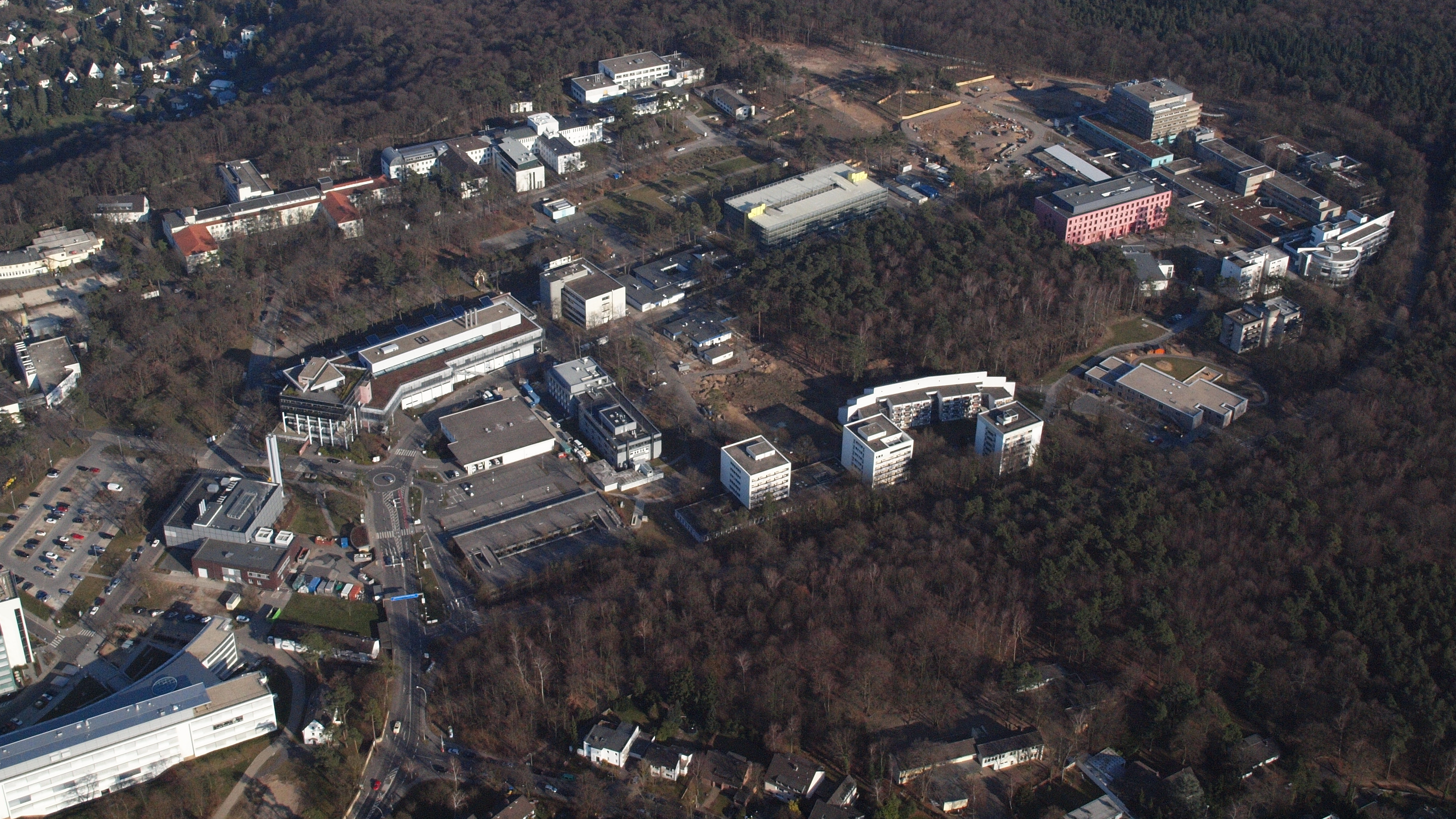 Venusberg, Universitätsklinikum Bonn: südlicher Bereich, von Westen aus gesehen (Lageplan)